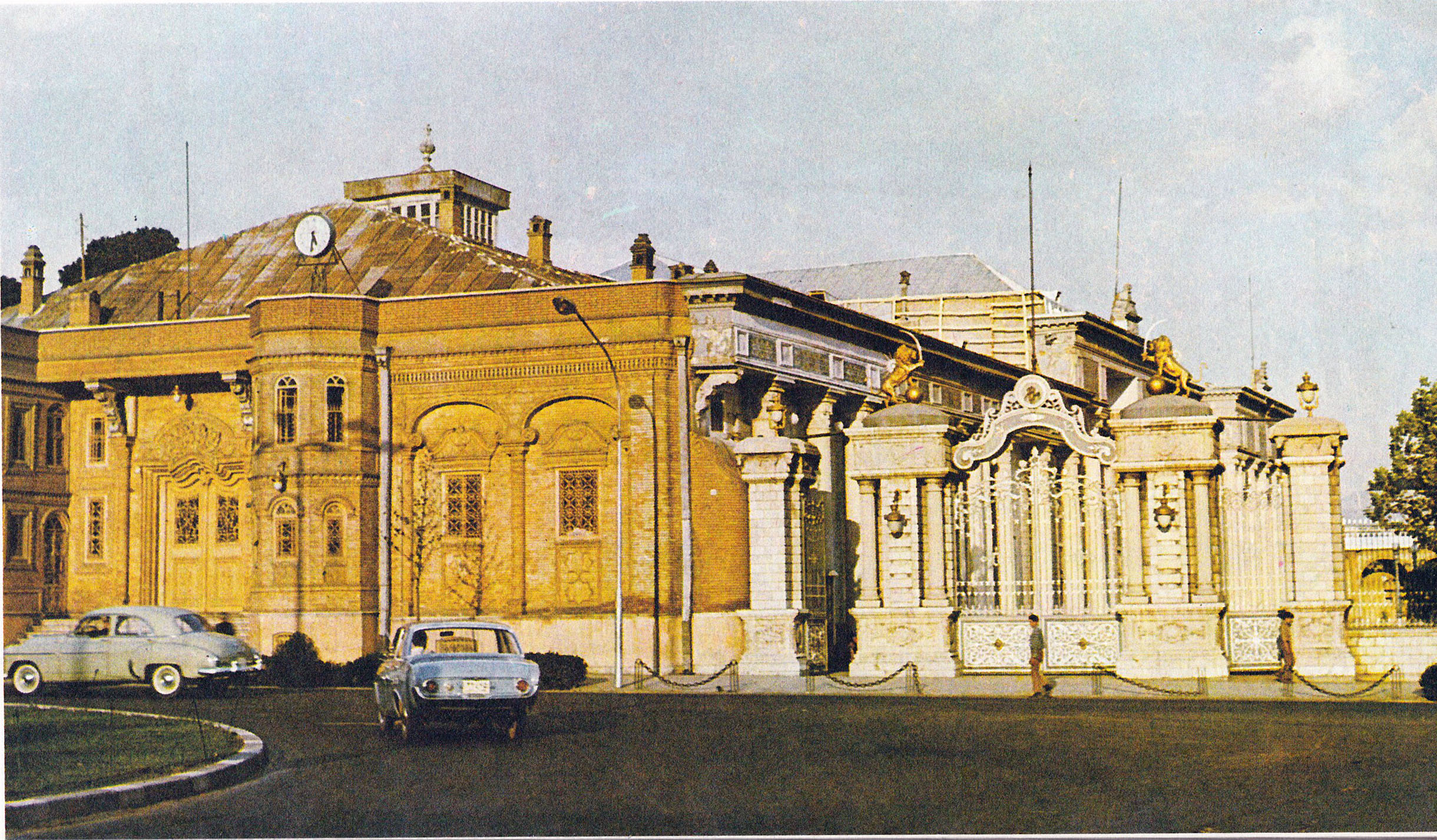 نمایی از ساختمان و سر در مجلس شورای ملی در میدان بهارستان تهران در دهه چهل و پنجاه خورشیدی